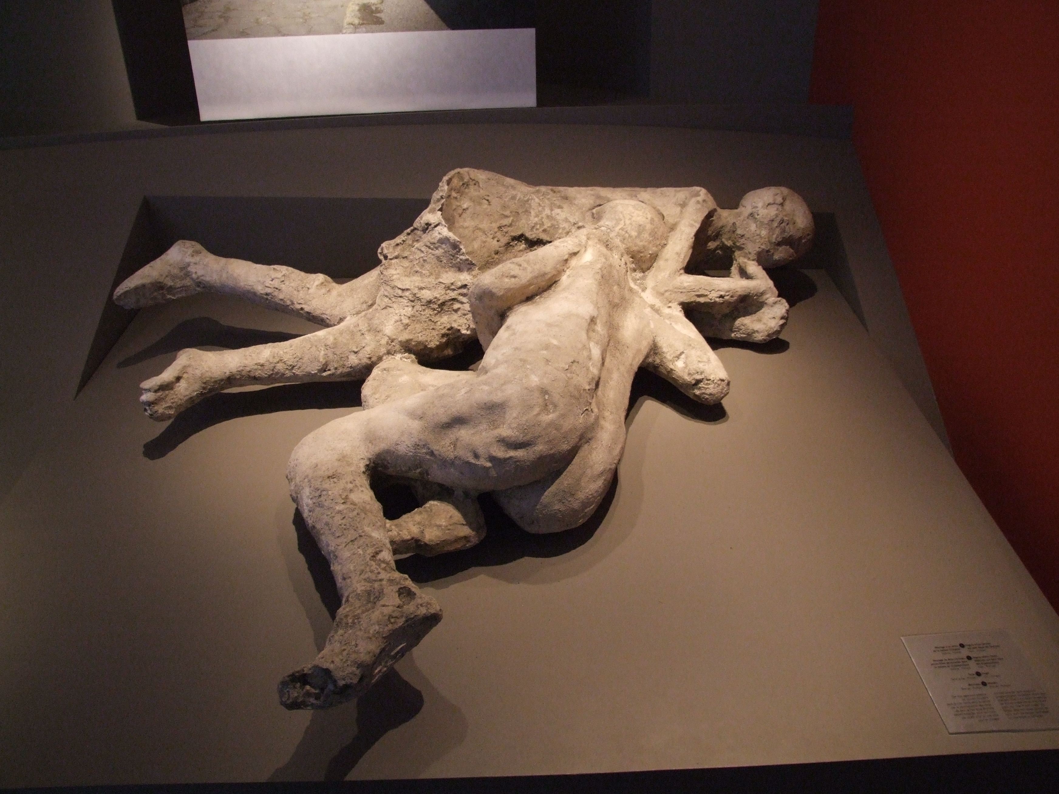 Gipsabdrücke von Hohlräumen, die Opfer in Pompeiji, dort verschüttet 79 n.Chr hinterlassen haben. Pompeji-Ausstellung 2007, Europäischer Kulturpark Bliesbruck-Reinheim Casts of the victims in Pompeii, buried in 79 AD left. Pompeii Exhibition 2007, the European Culture Park Bliesbruck-Net home